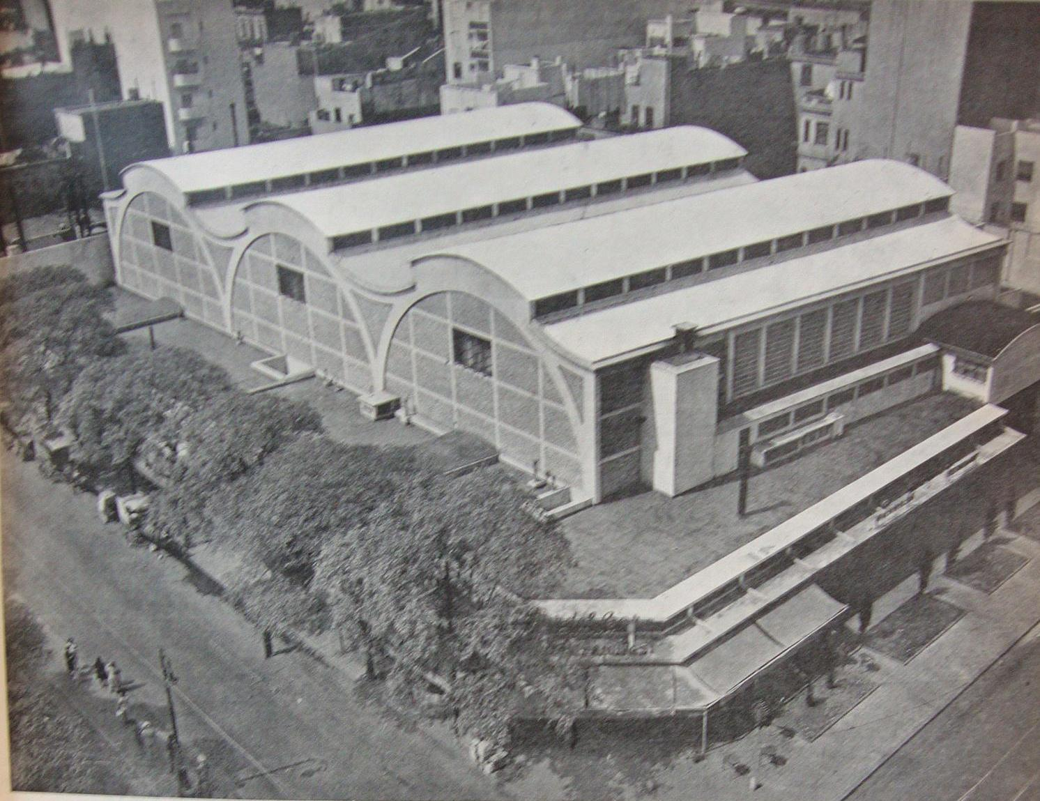 Vista aérea del Mercado San Cristóbal, en la esquina de las avenidas Entre Río e Independencia, en Buenos Aires. Obra del estudio SEPRA (1945).